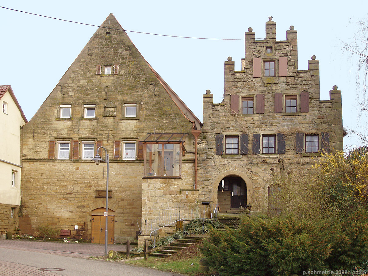 Schlosskellerei und Fruchtkasten, Nebengebäude des einstigen Schlosses in Zaberfeld-Ochsenburg